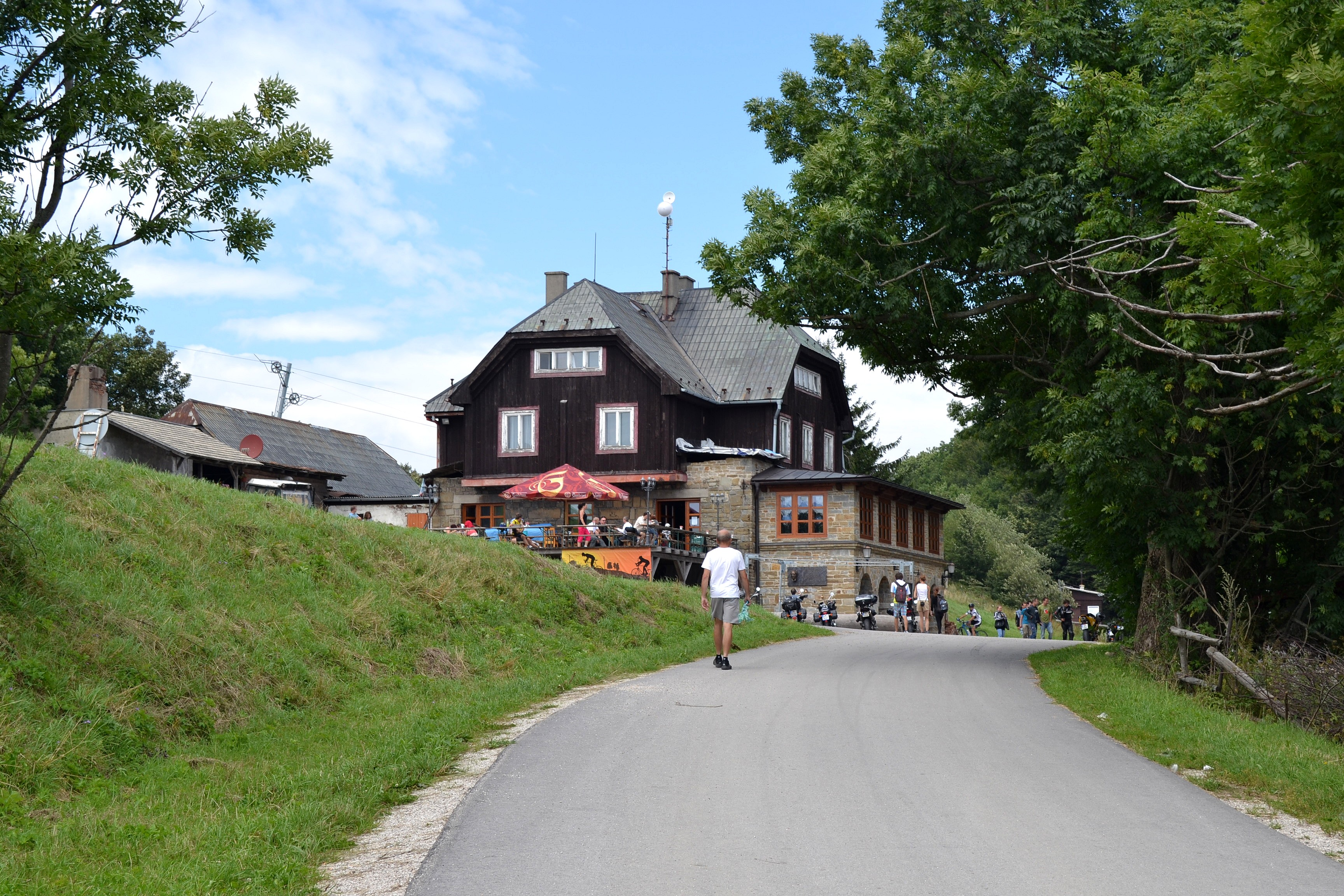 Holubyho chata - prístup od parkoviska